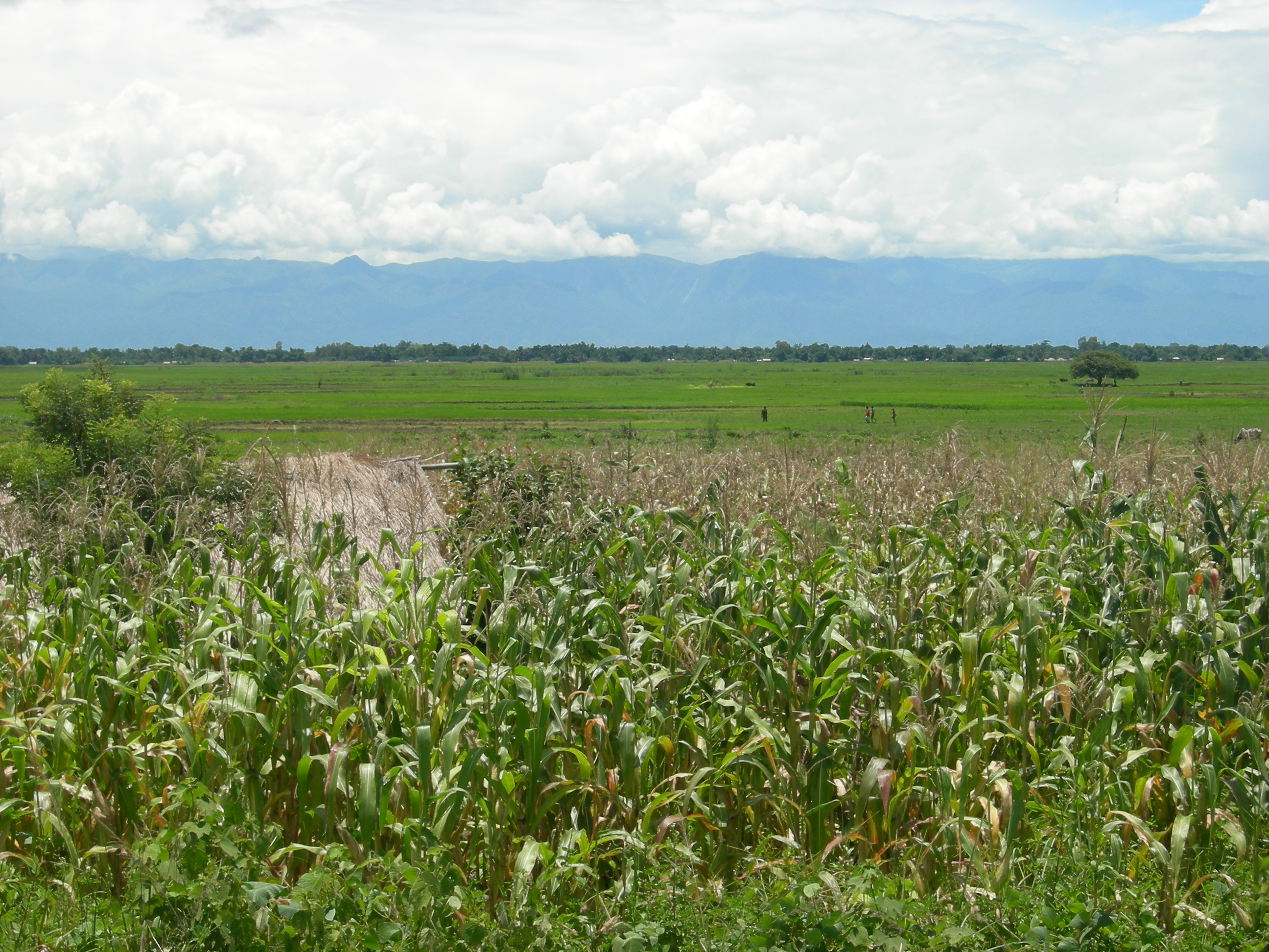 Agriculture in Malawi